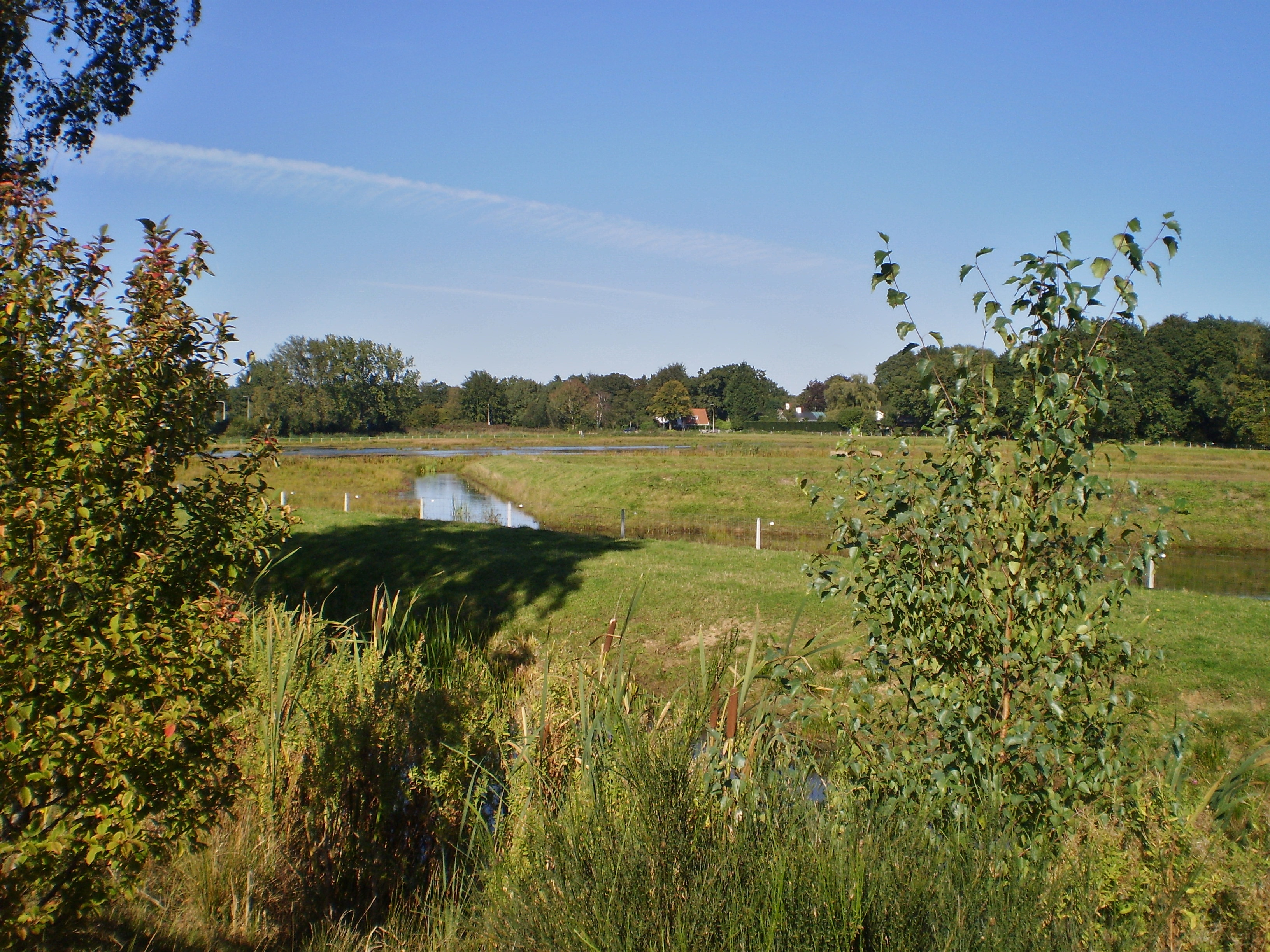 Gijzenveen tussen Bussum en de Hilversumse Meent